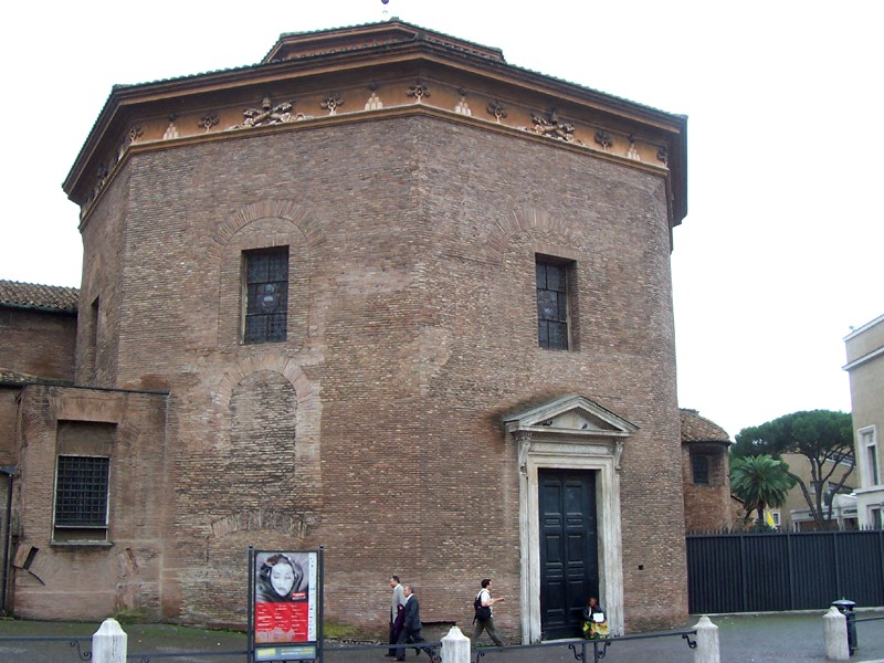 Roma - Battistero Lateranense